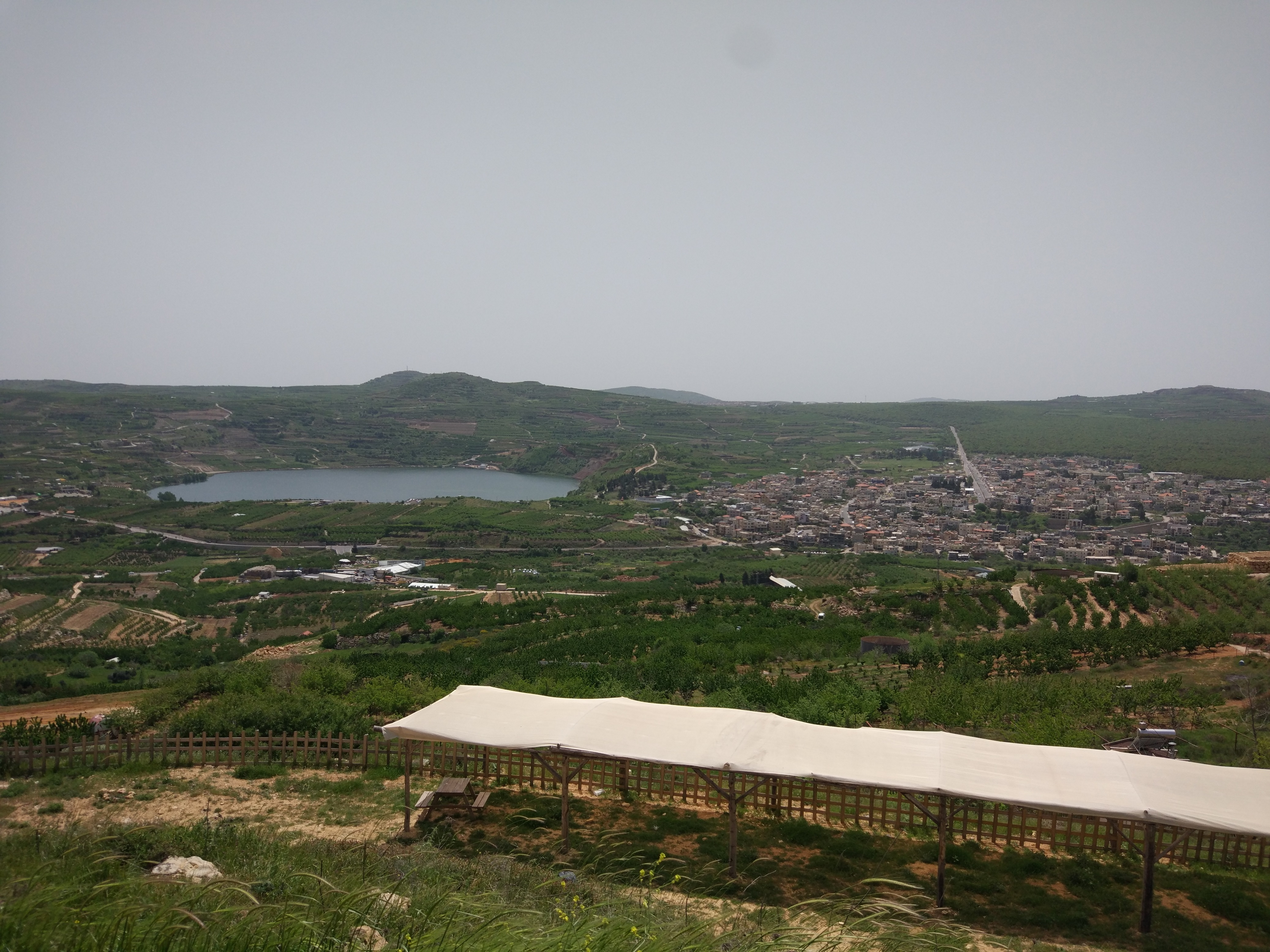 ברכת רם ומסעדה בצילום מהיישוב נמרוד